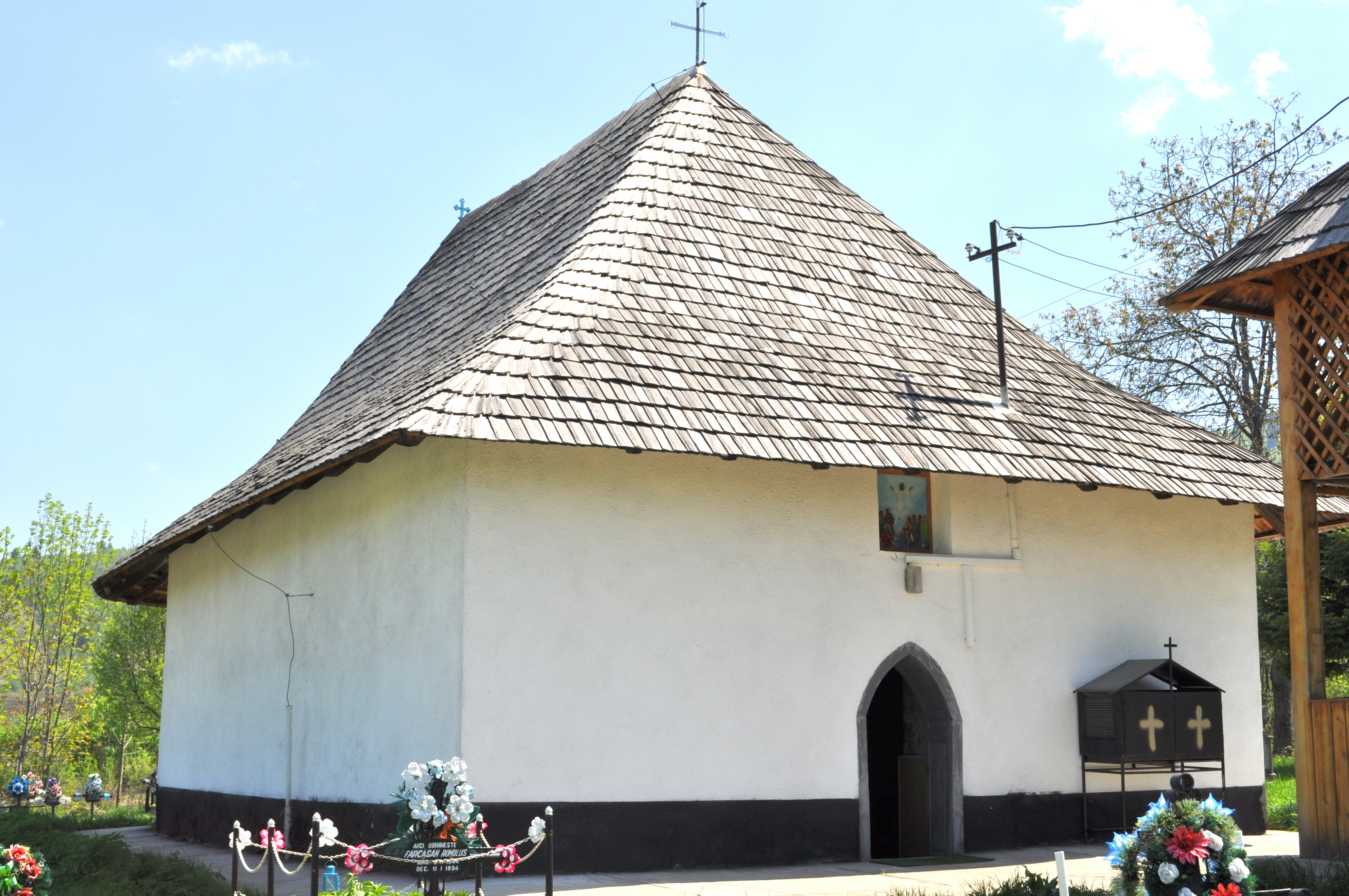 Biserica "Înălţarea Domnului" , sat NUCŞOARA; comuna SĂLAŞU DE SUS